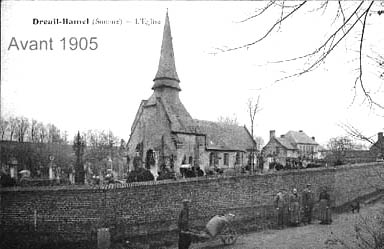 Dreuil-Hamel (Carte postale ancienne) - Photographiée par Paul VASSEUR et communiquée pour publication à Marc ROUSSEL (Markus3).